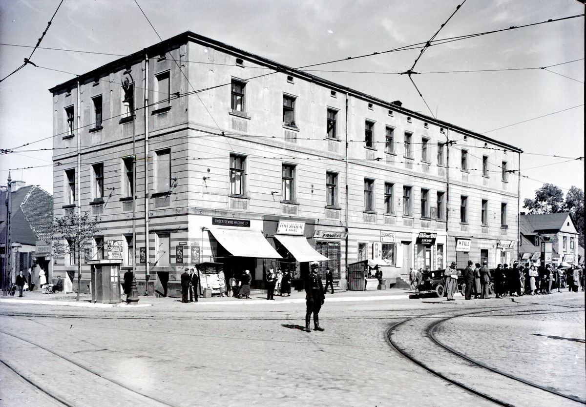 Dom byłego Banku Polskiego (Górny Rynek)